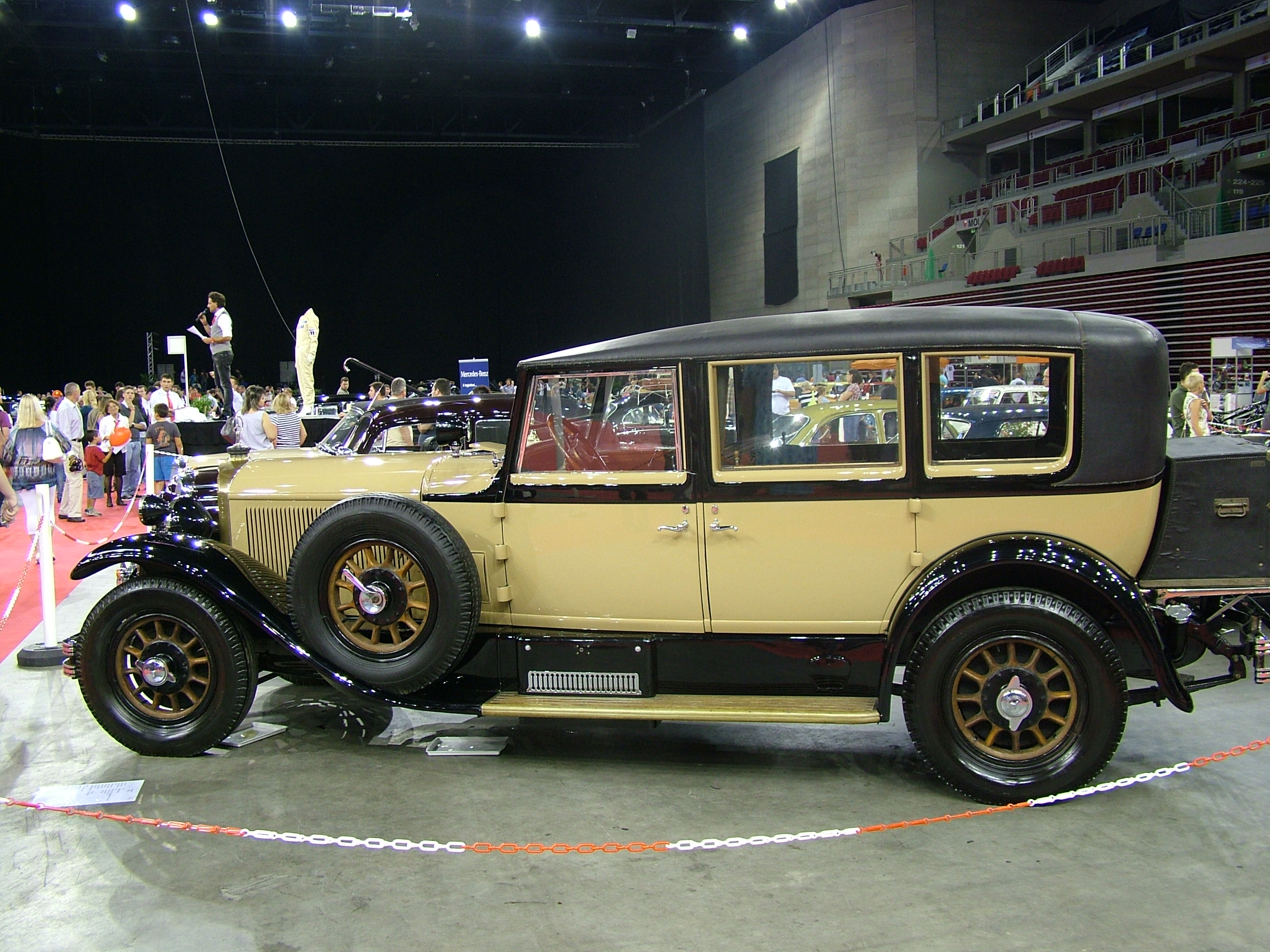 Mercedes-Benz 630K, 1927